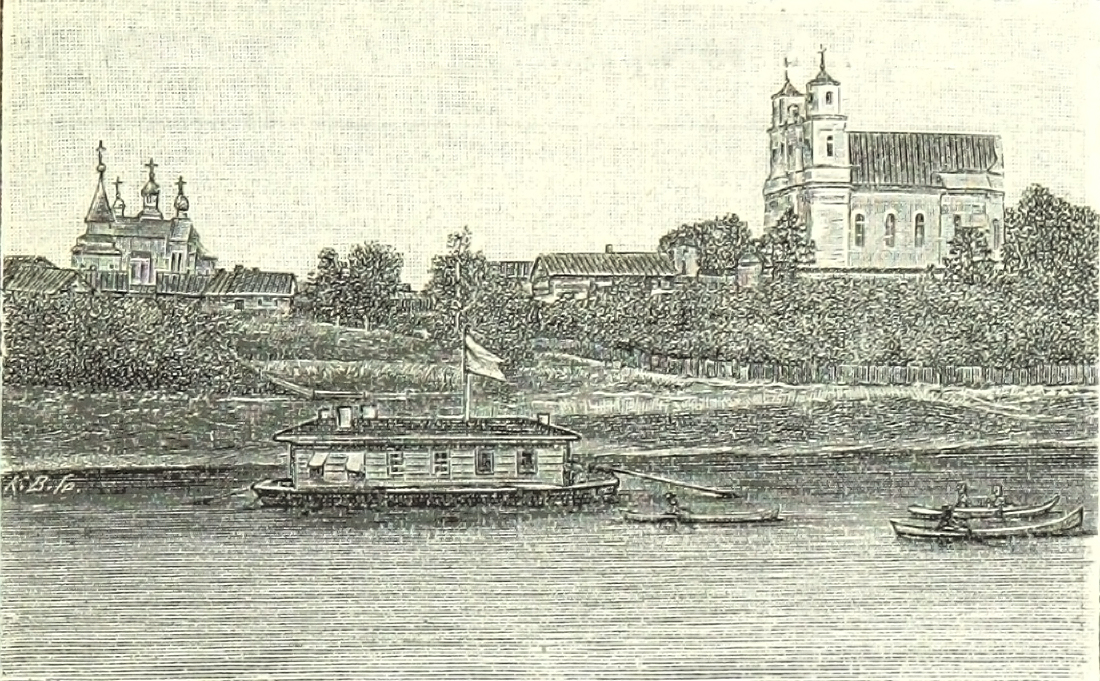 Беларуская (тарашкевіца): Друя (Druja), Прыдруйск (Prydrujsk). Царква і касьцёл